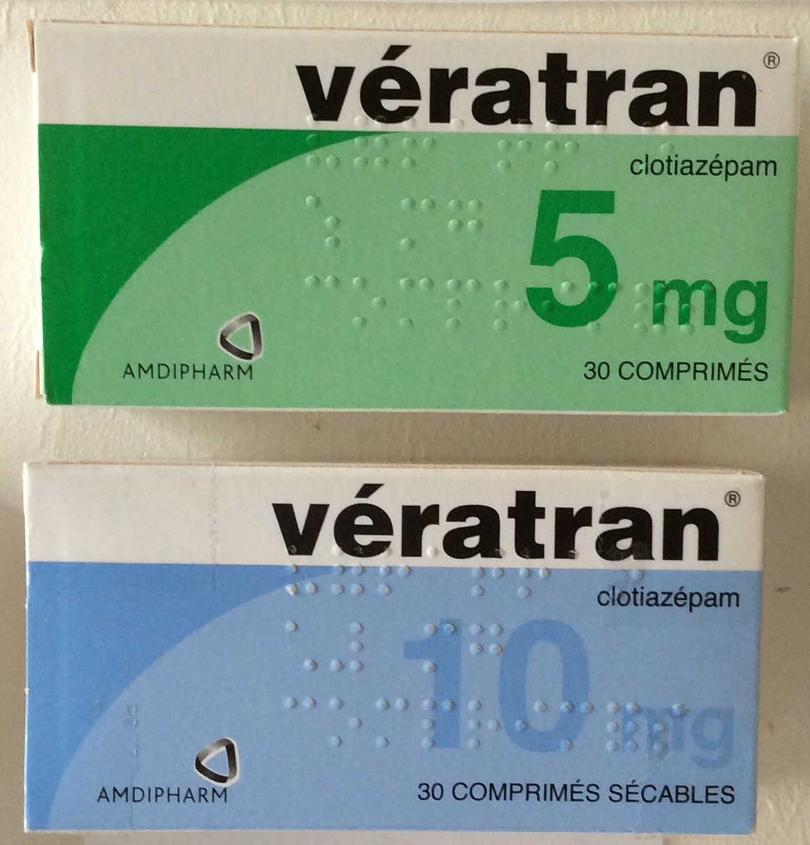 Boites de Vératran 5 mg et 10 mg